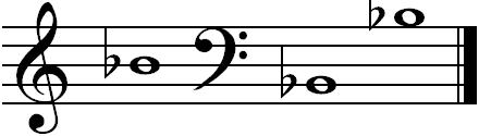 koobak